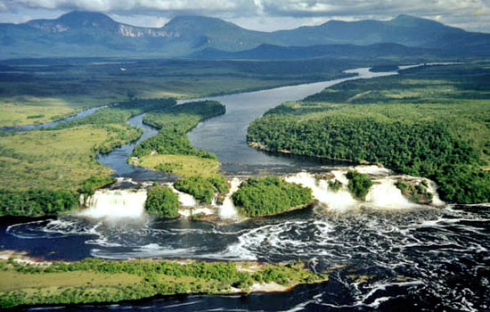 Río Carrao, Parque Nacional Canaima